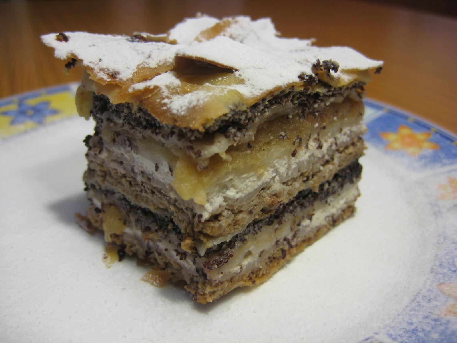 Prekmurska gibanica, traditional food from Prekmurje, Slovenia